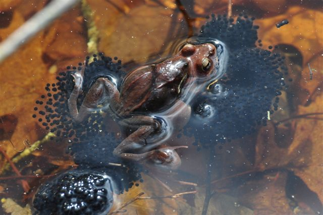 Ninigret National Wildlife Refuge, RI Photo: Tom Tetzner/USFWS